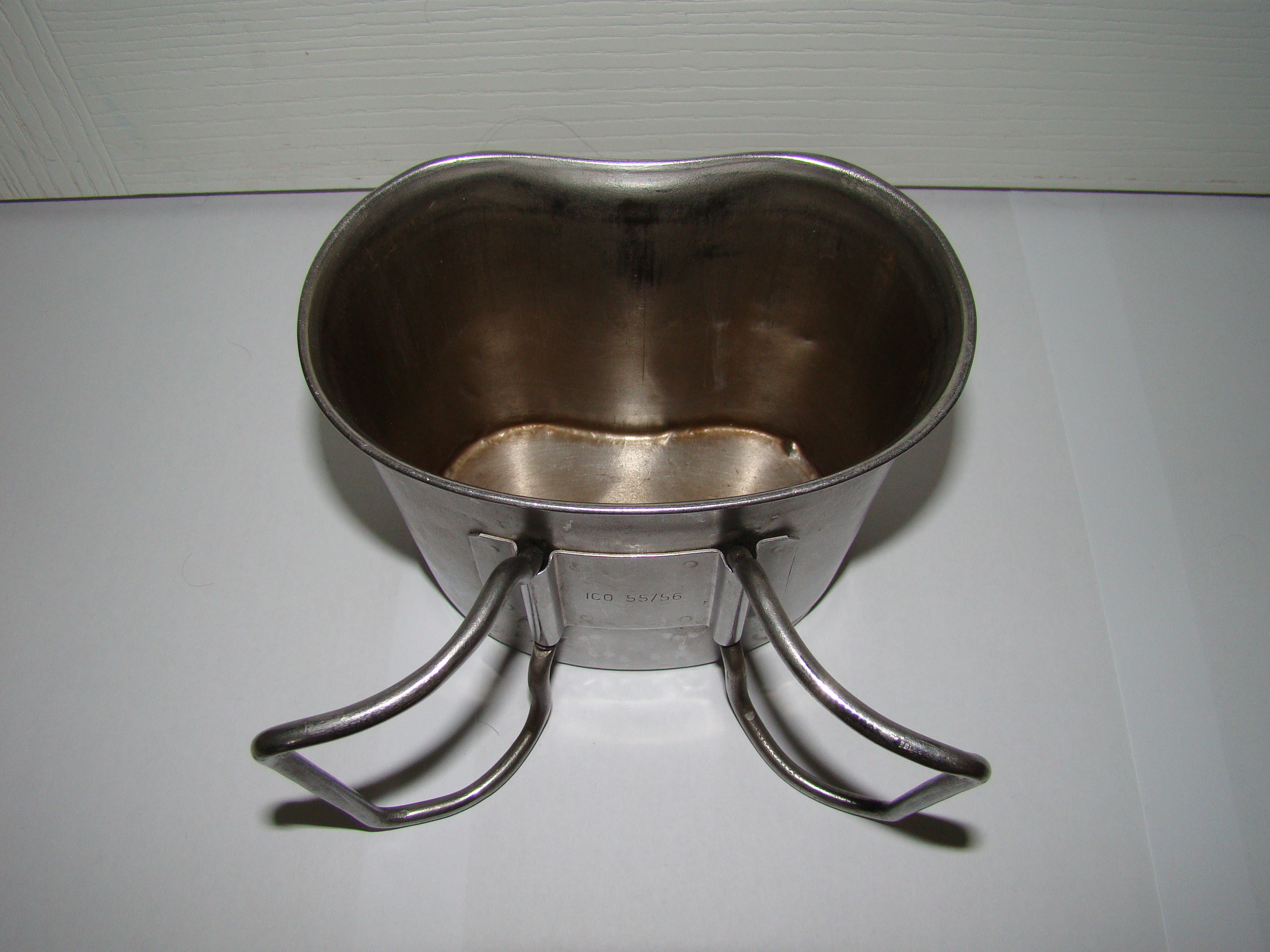 Kubek nowego typu do manierki.